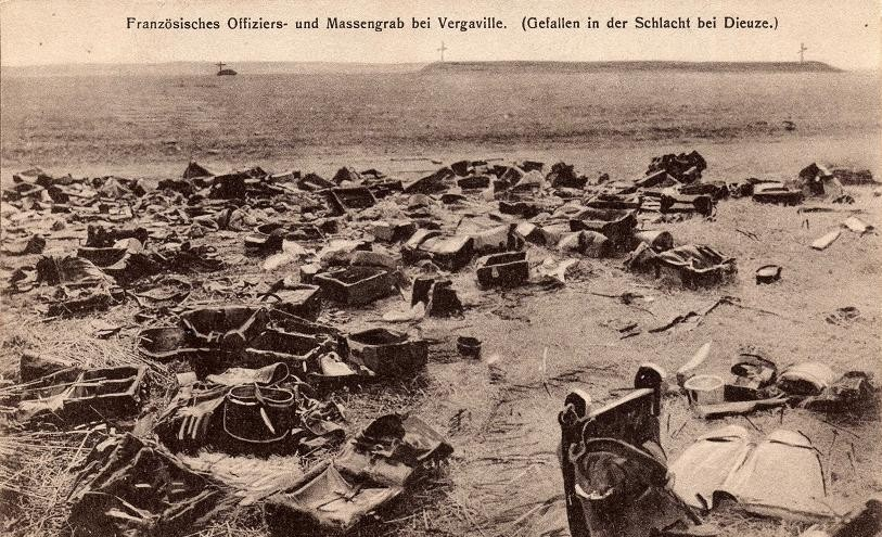 Équipement français abandonné sur le champ de bataille près de Dieuze en août 1914.